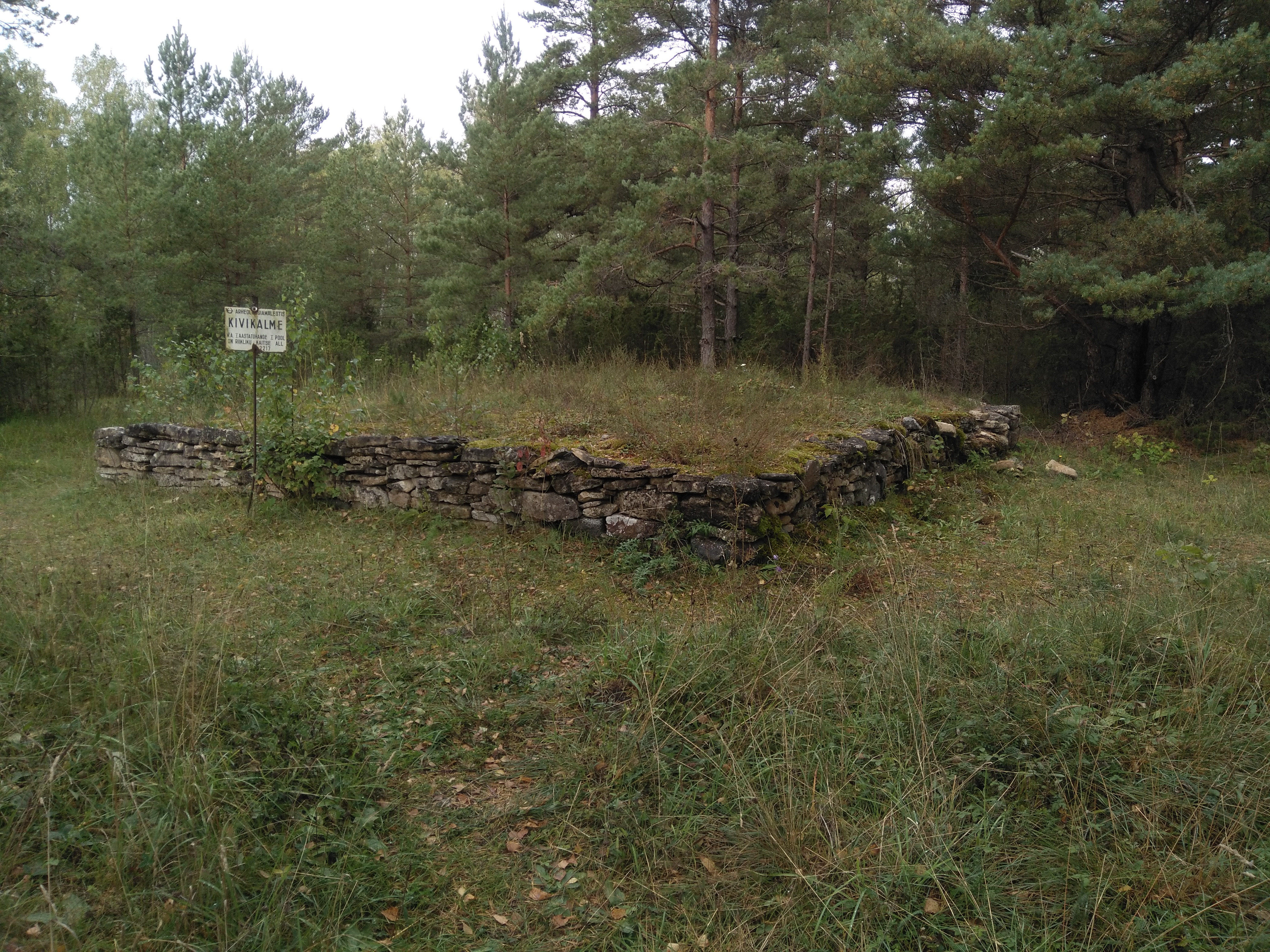 Muistne matusekoht